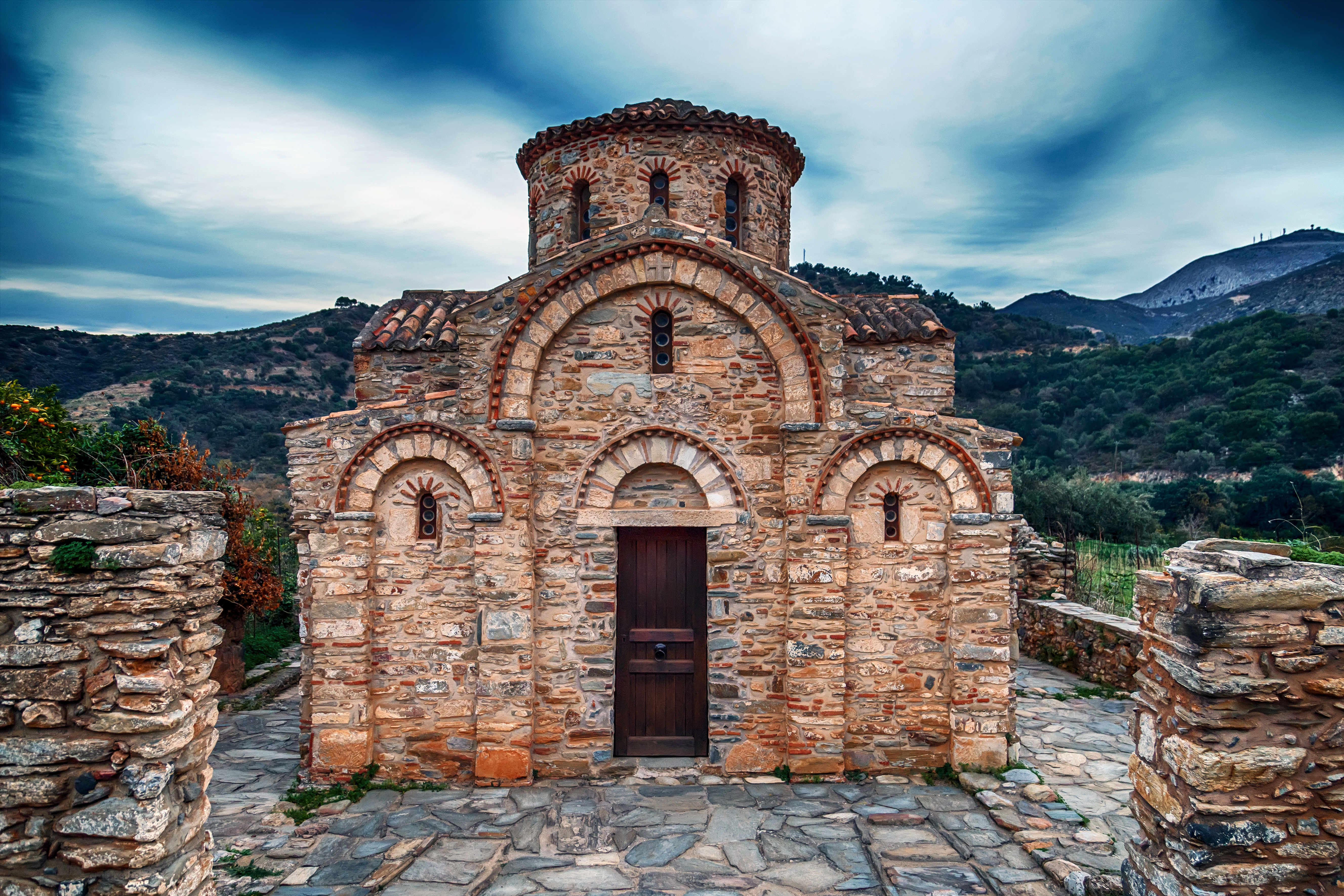 «Ναός Παναγίας Φόδελε»